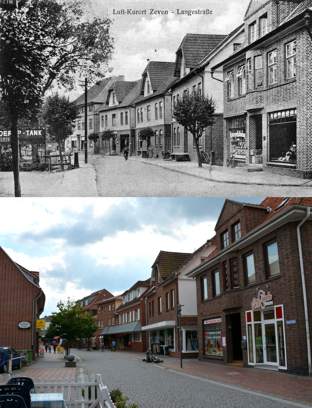 Lange Straße - Richtung Vitusplatz Zeven